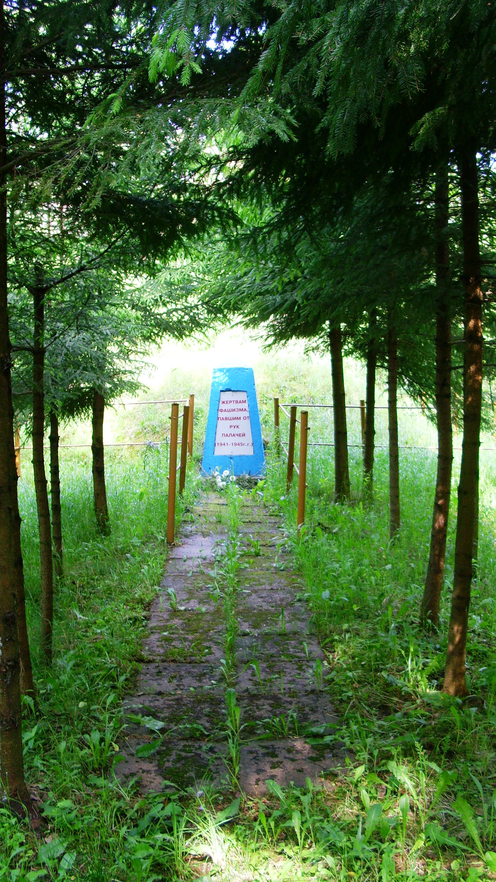 Памятник 353 убитым во время Холокоста евреям в урочище Ройста Ошмянского района.